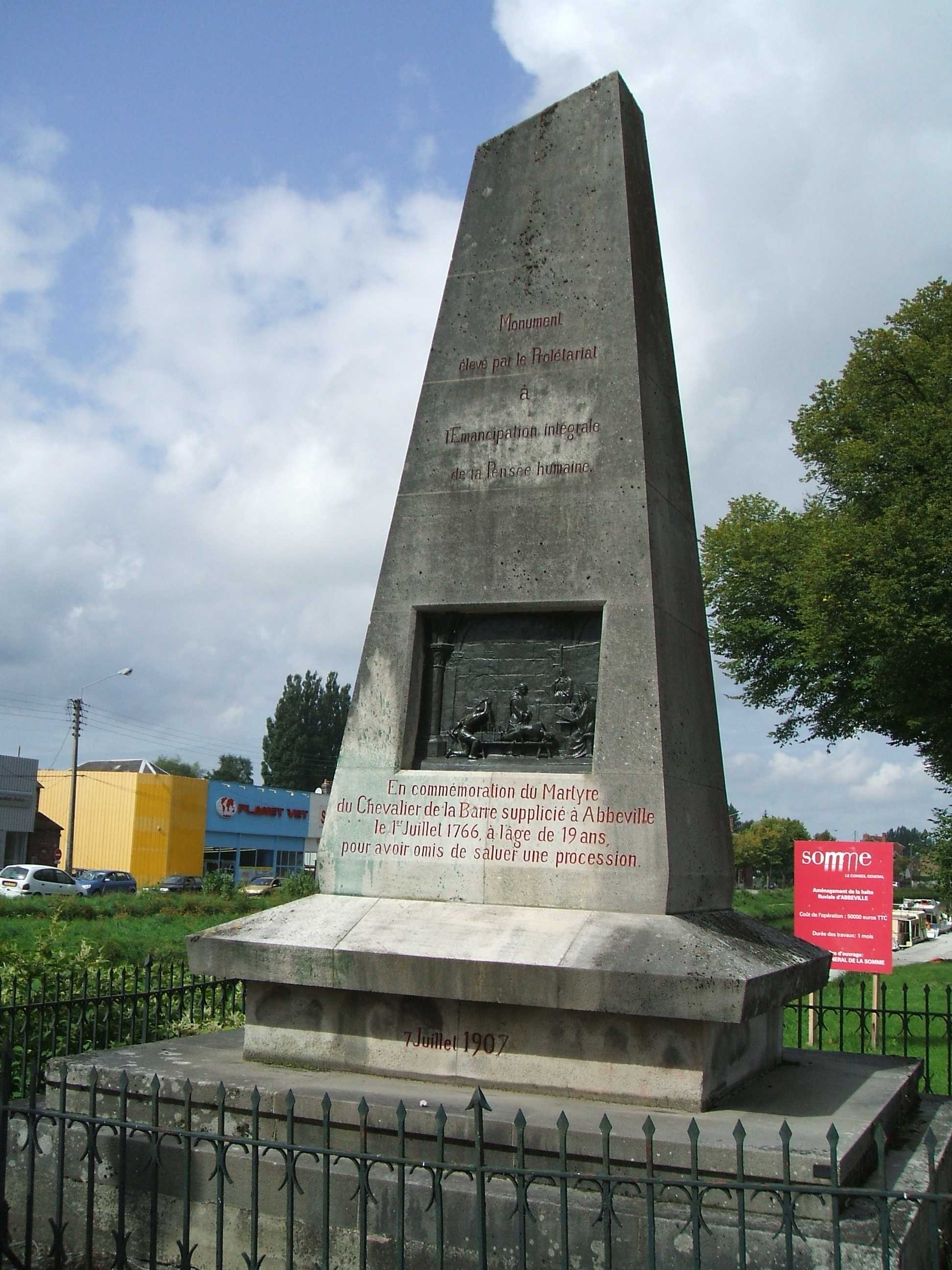 Monument élevé par le Prolétariat à l'Émancipation intégrale de la Pensée humaine. En commémoration du Martyre du Chevalier de la Barre supplicié à Abbeville le 1er Juillet 1766, à l'âge de 19 ans, pour avoir omis de saluer une procession. 7 Juillet 1907